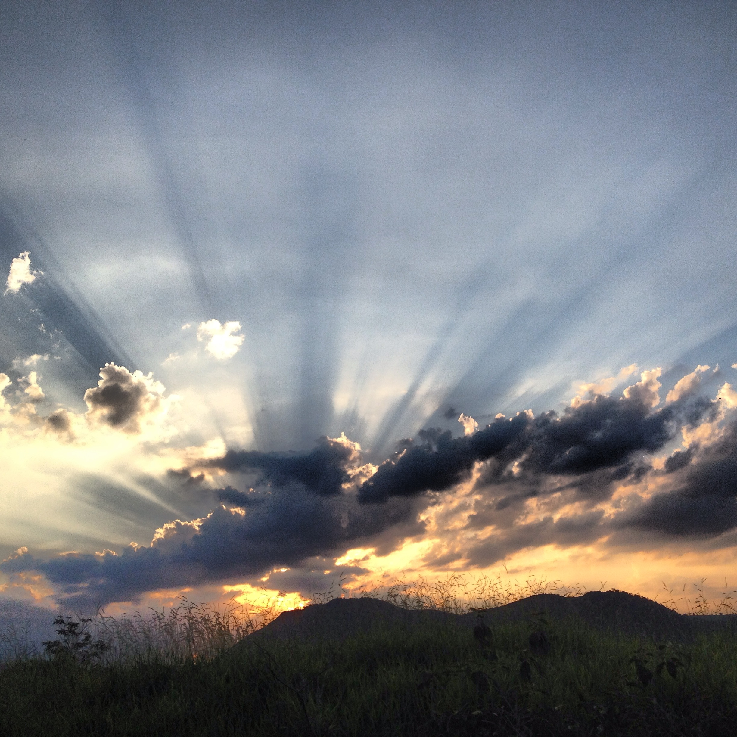 Morro Pelado, em Águas de Lindóia, SP, visto ao pôr do sol.